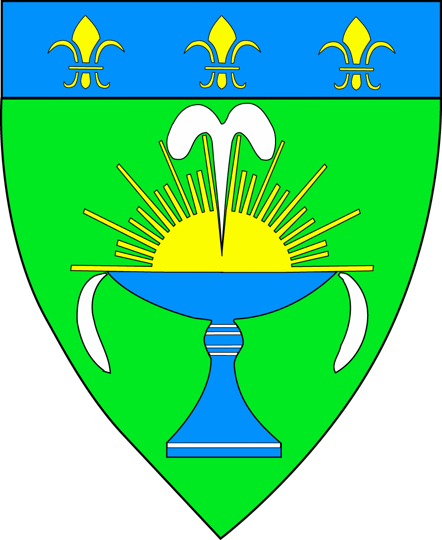 Blason de la ville de Pougues-les-Eaux De sinople à la fontaine cousue d'azur jaillissante d'argent, rayonnante d'or, au chef aussi cousu d'azur chargé de trois fleurs de lys aussi d'or.